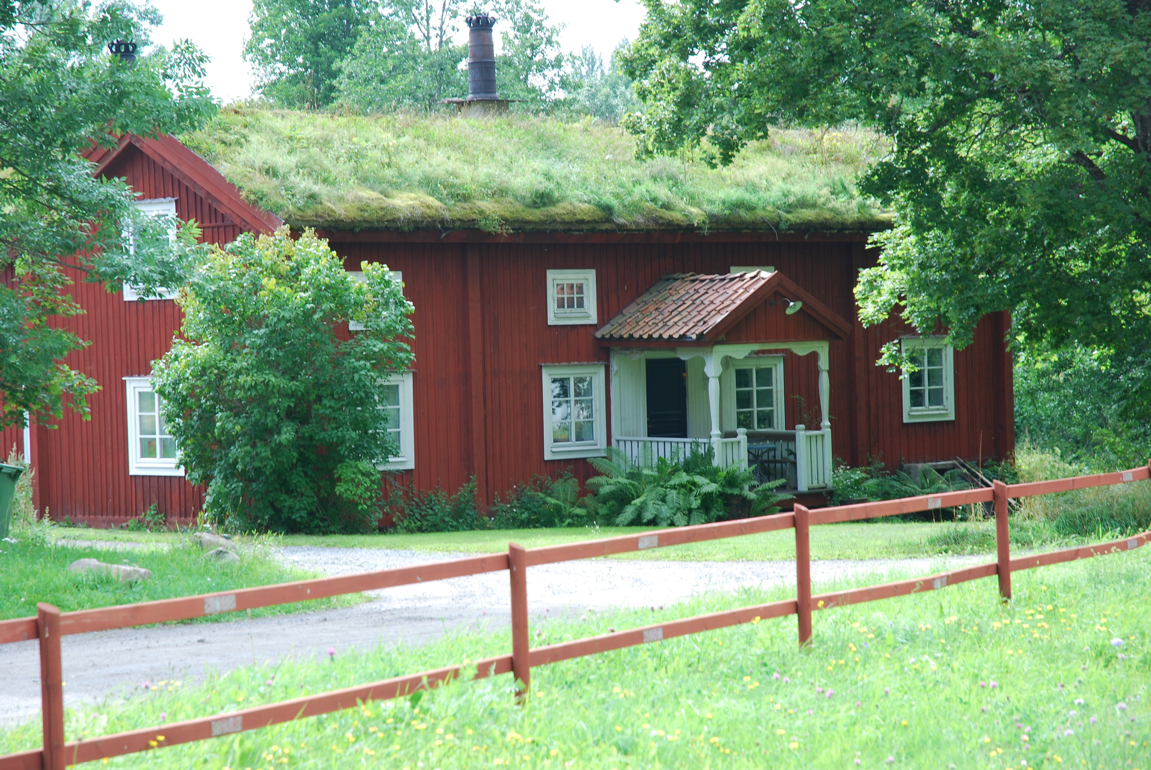 Bergsmansgård, Gamla Pershyttan